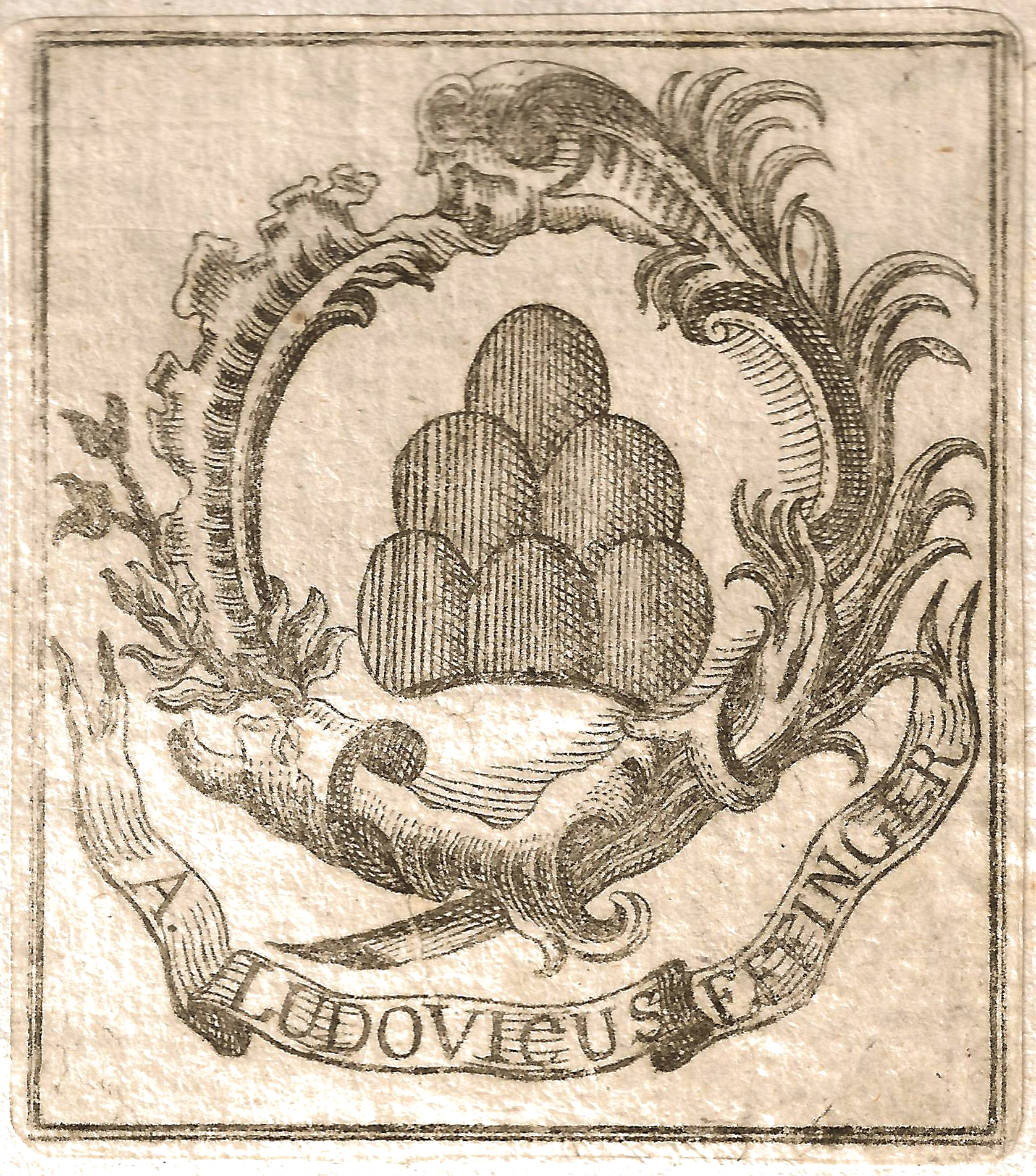 Exlibris Anton Ludwig Effinger (1723-1792), Kommandant zu Aarburg, bernischer Salzdirektor.